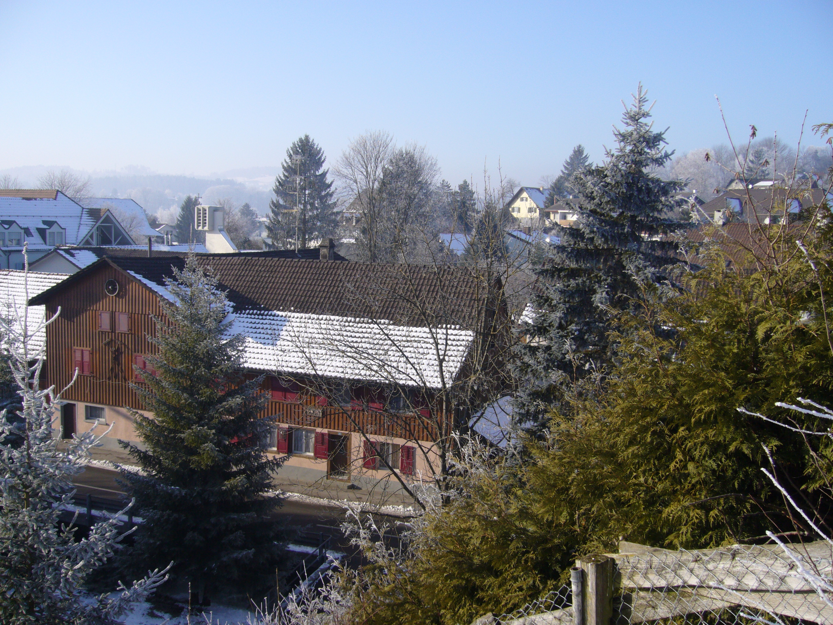 Blick vom Töönler auf den Dorfkern von Matzingen.